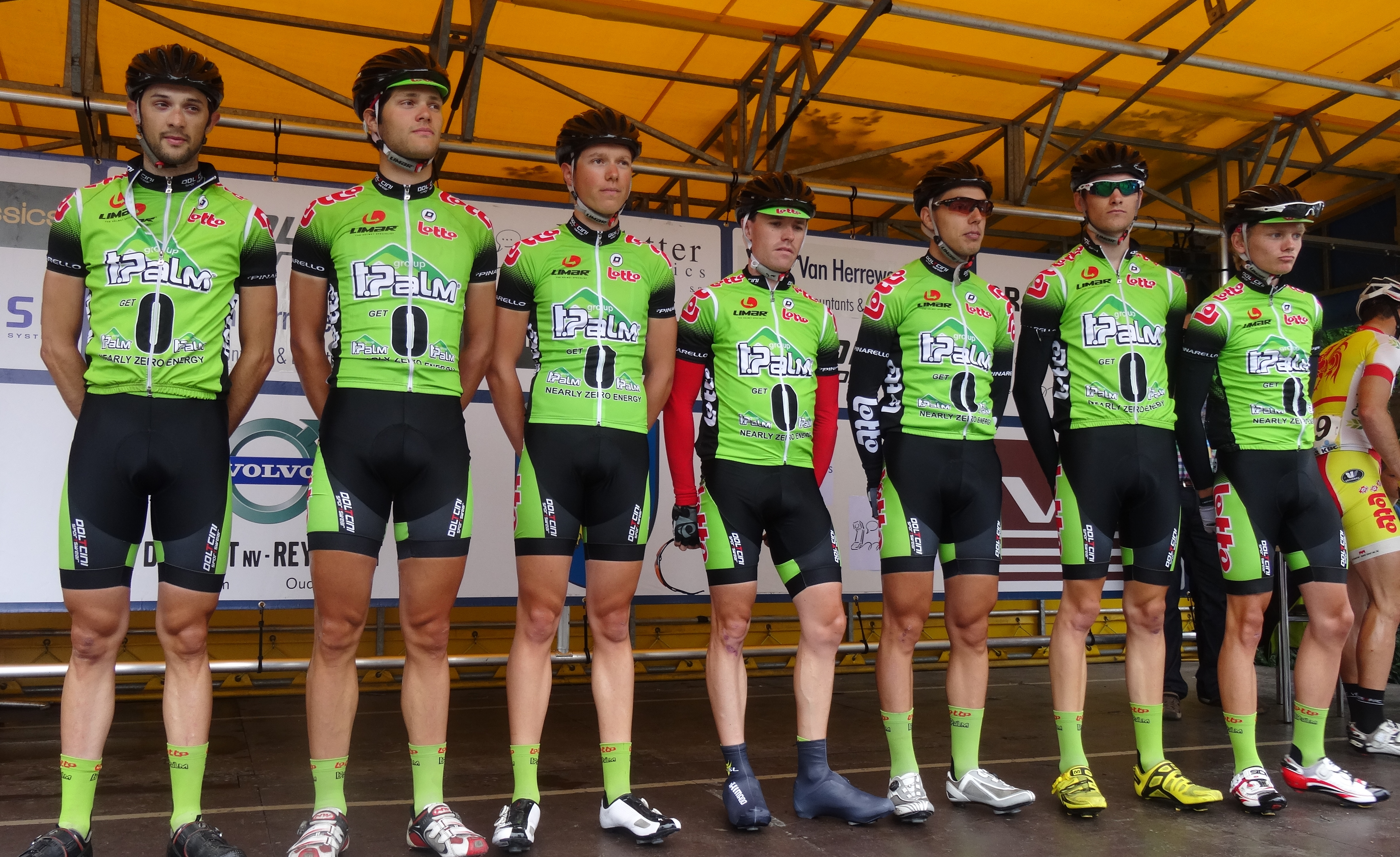 Reportage photographique réalisé le samedi 5 juillet à l'occasion du départ et de l'arrivée du Circuit Het Nieuwsblad espoirs 2014 à Grotenberge (Zottegem), Belgique.